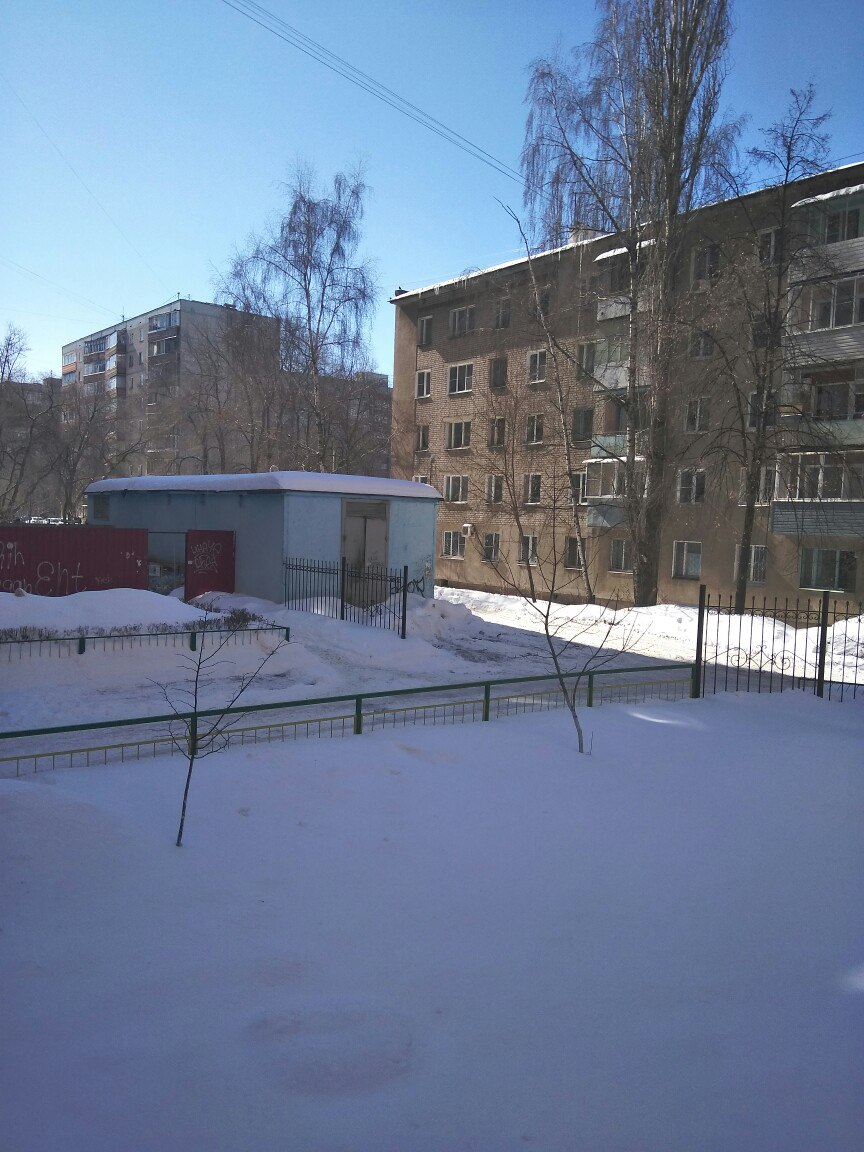 Конец марта в Левобережном районе г. Воронежа